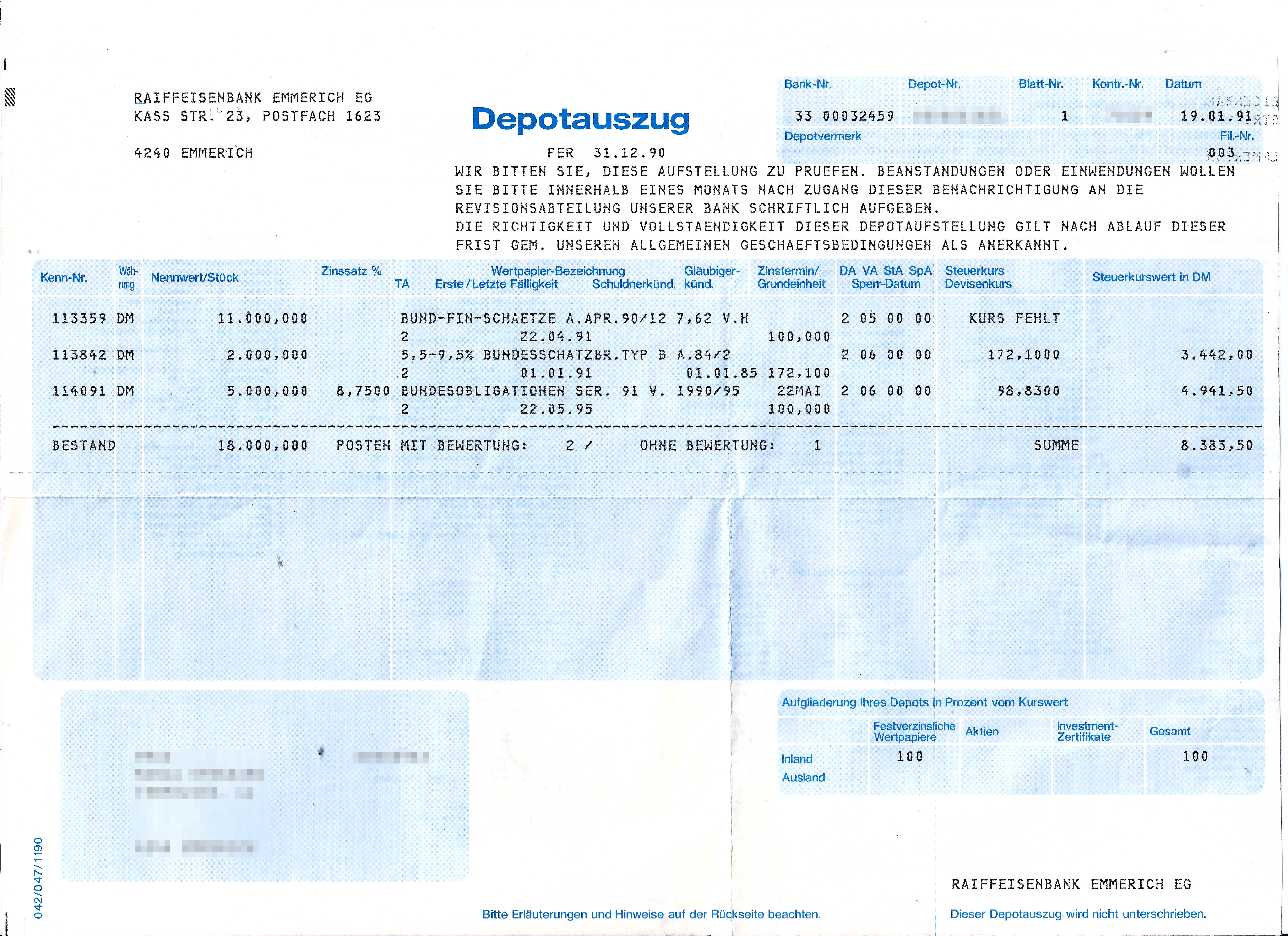 Depotauszug der Raiffeisenbank Emmerich per 31.12.1990. U.a. Bundesschatzbrief Typ B und Bundesobligation